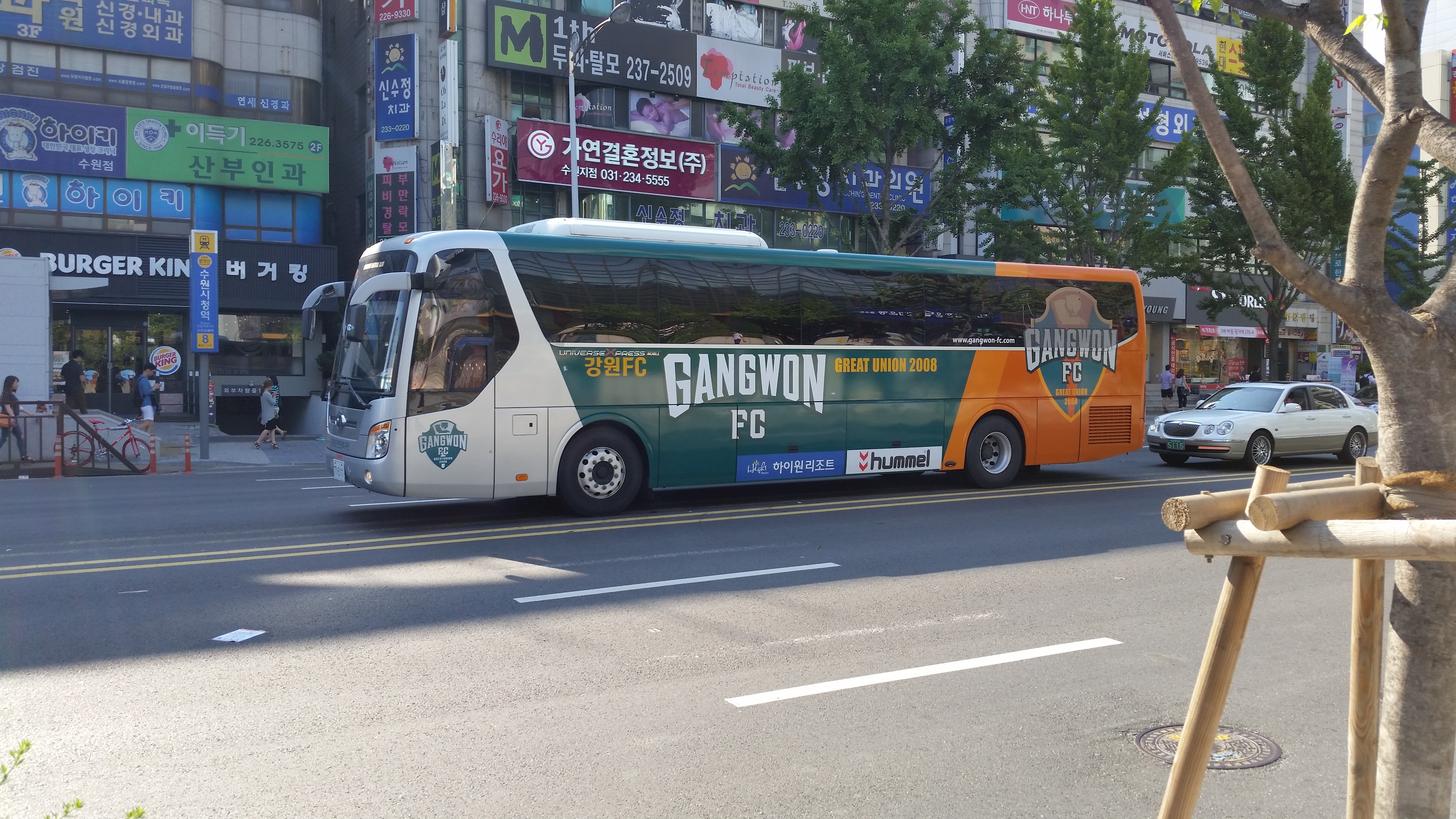 in Suwon